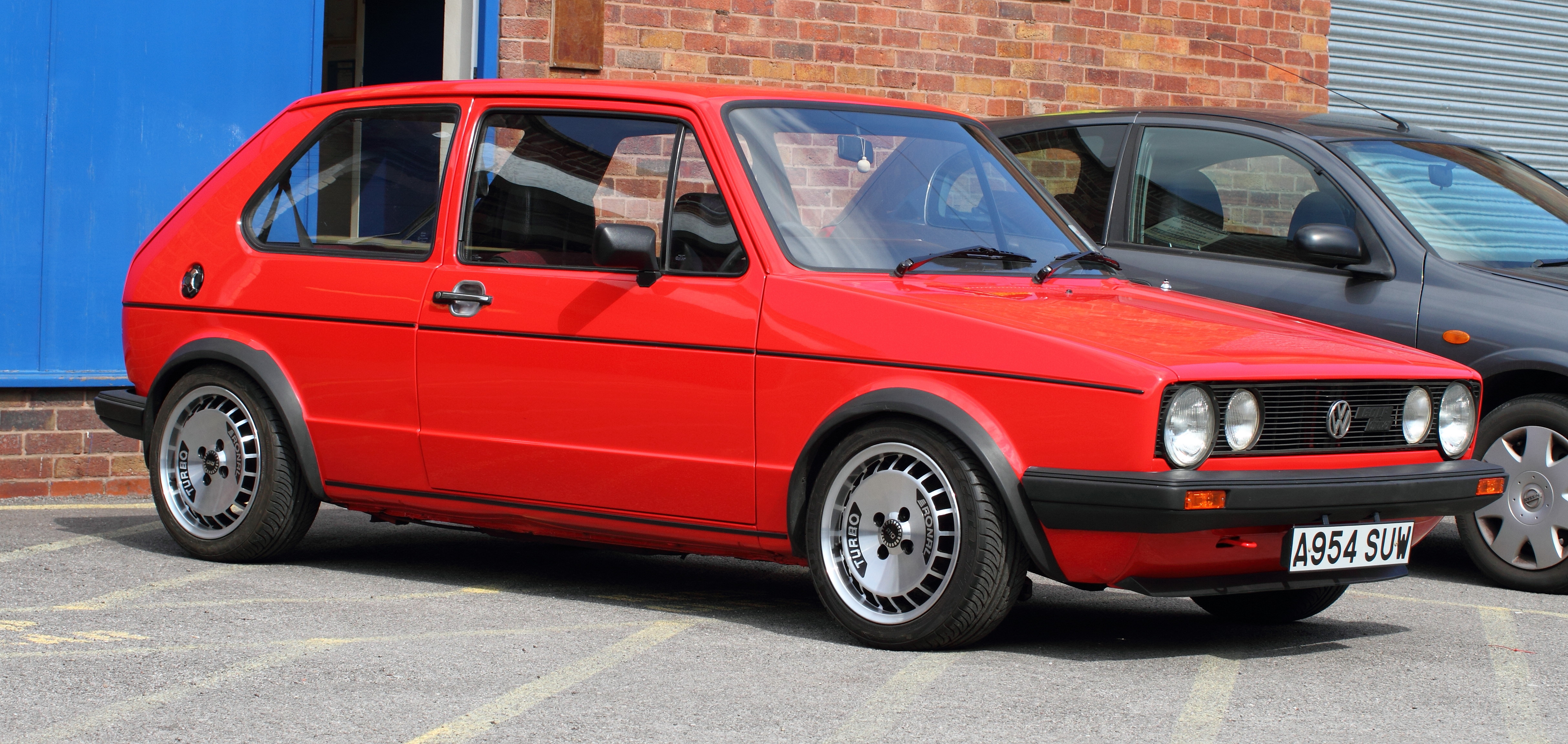 83 MK1 Golf